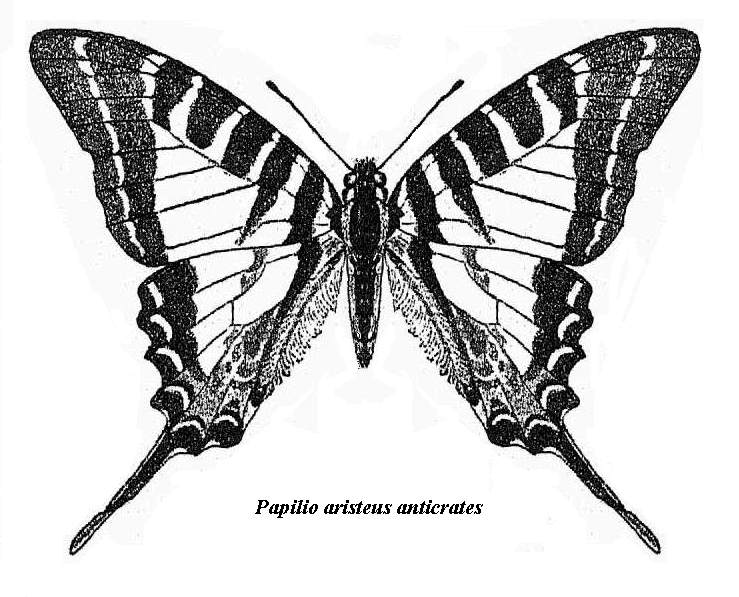 Papilio aristeus anticrates = Graphium aristeus anticrates (Doubleday, 1846)